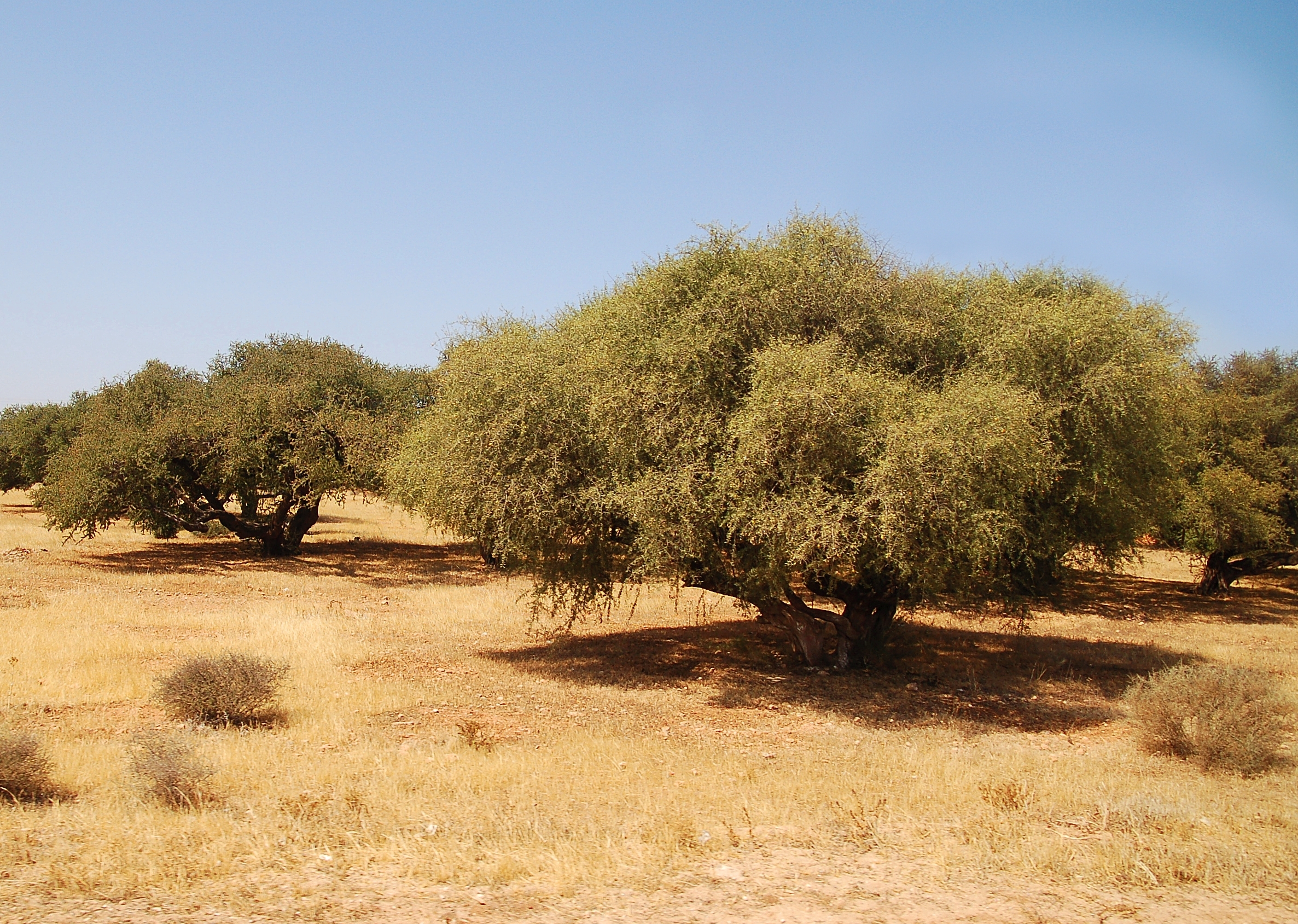 Arganier plantation Maroc Essaouira